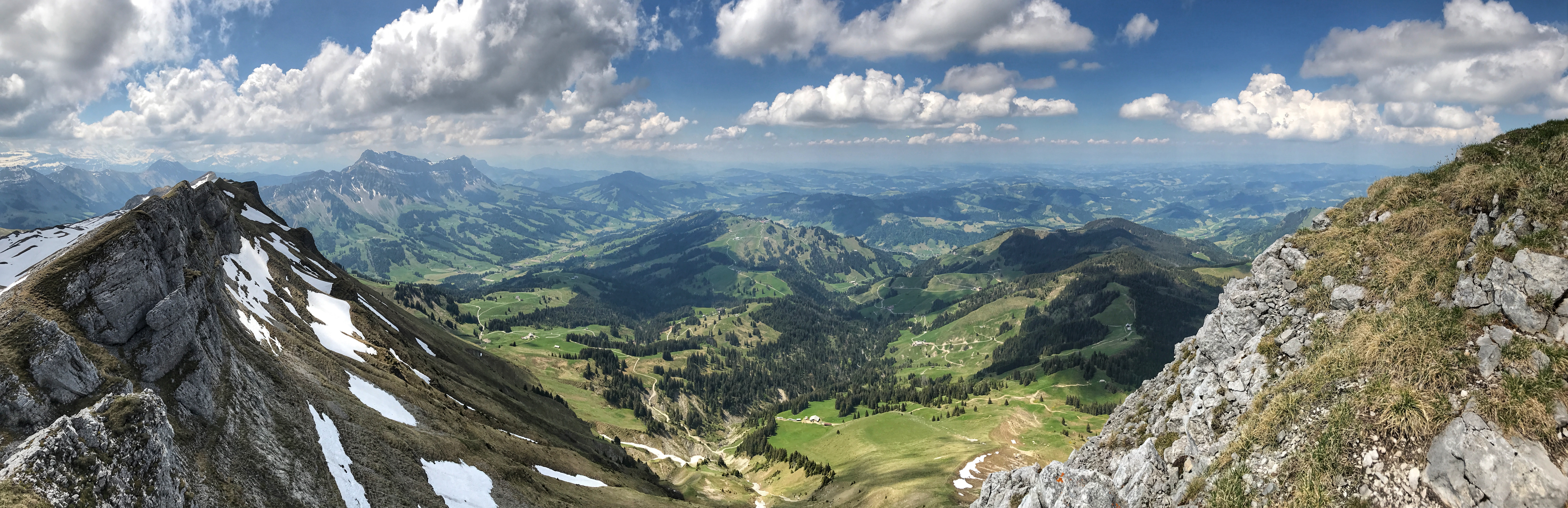 Panorama in Richtung Westen vom Hengst